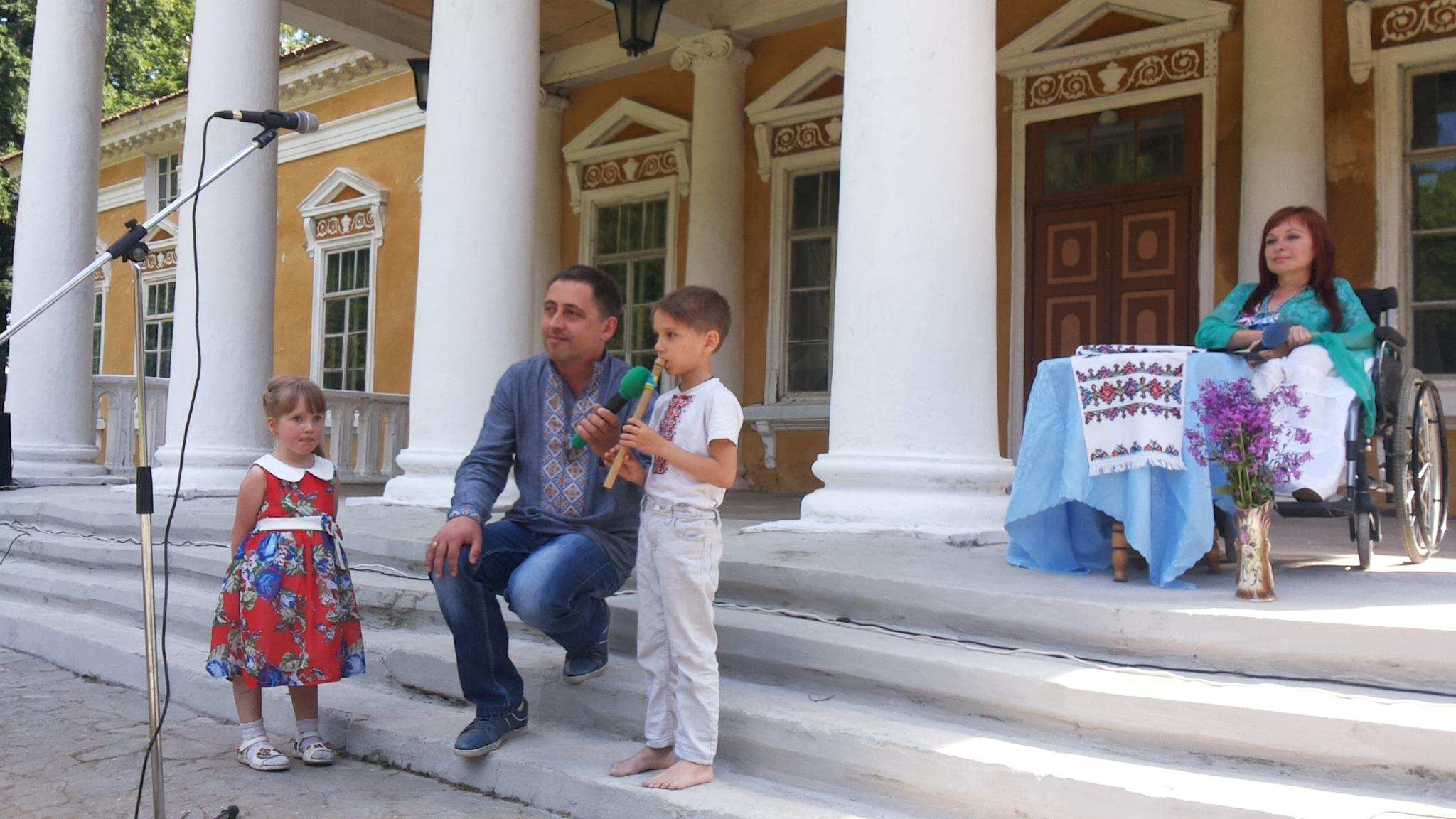 Імпреза по самчиківськи